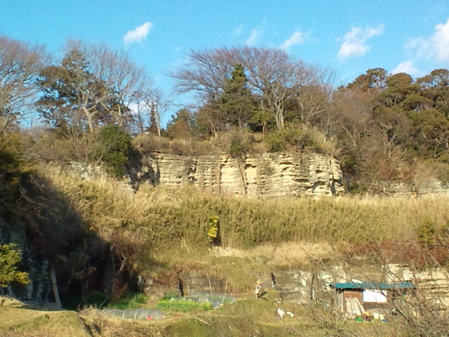 鎌倉・逗子間、名越の尾根南面にある大切岸。中世の石切り場跡とされる。